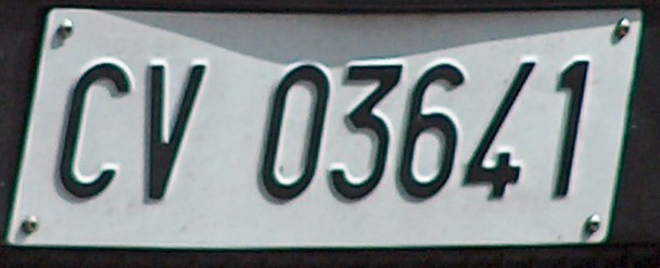 Kfz-Kennzeichen Angestellte bzw. Bürger aus dem Vatikan selbstfotografier, 2005